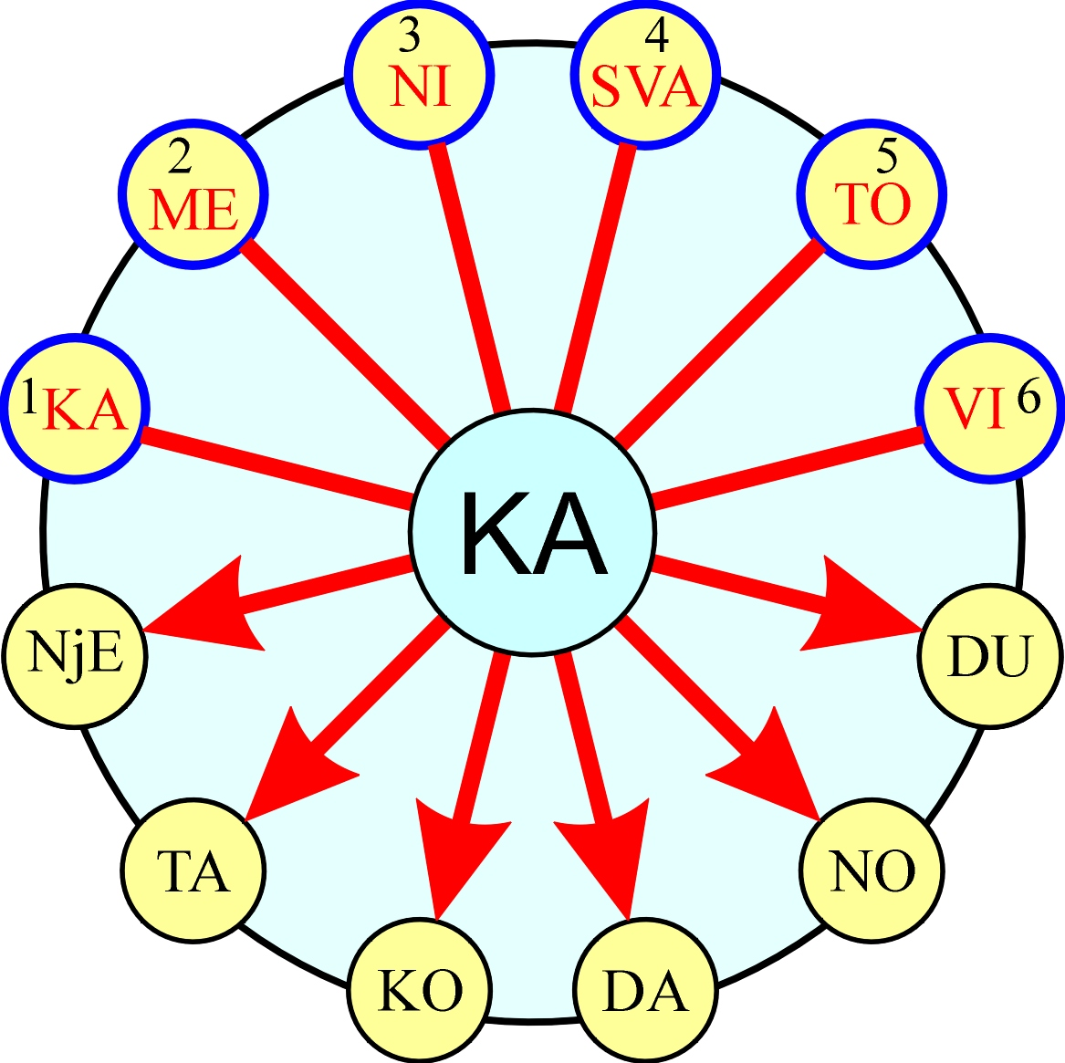 slogovna okolopružaljka s rješenjem Kameni svatovi (rješenje upisano)